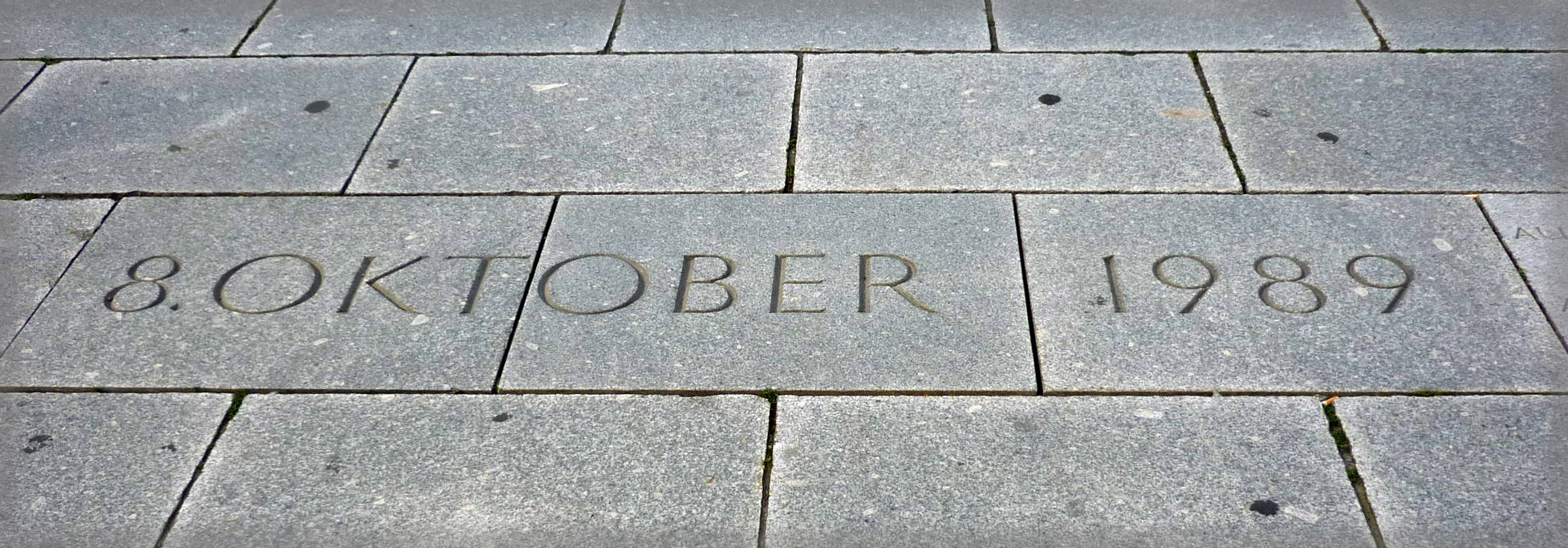 Gedenkstein zur Erinnerung an den 8. Oktober 1989 auf der Prager Straße